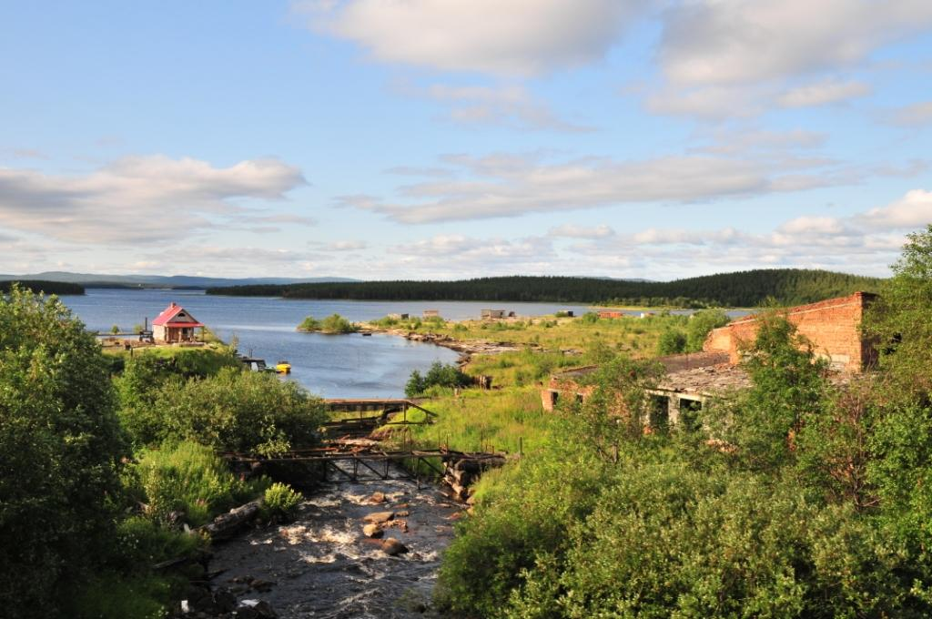 Устье реки Лупче-Савино